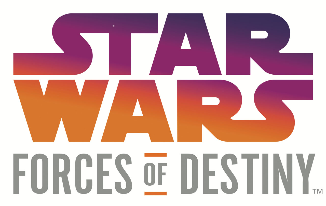 לוגו לסדרה Star Wars Forces of Destiny